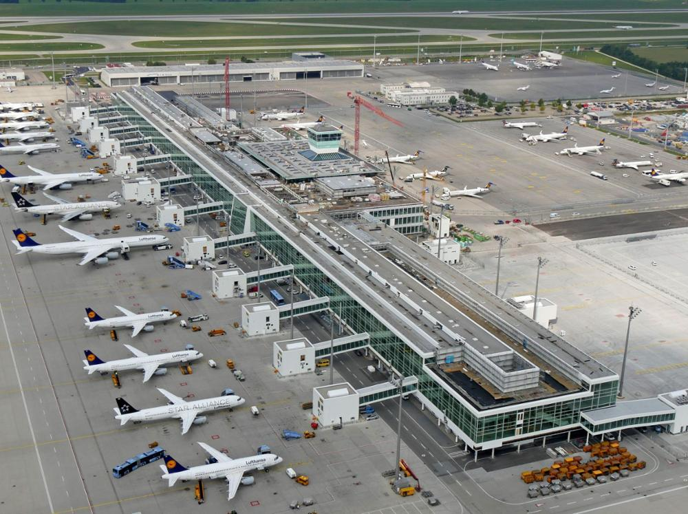 Il "Satellitenterminal" in costruzione